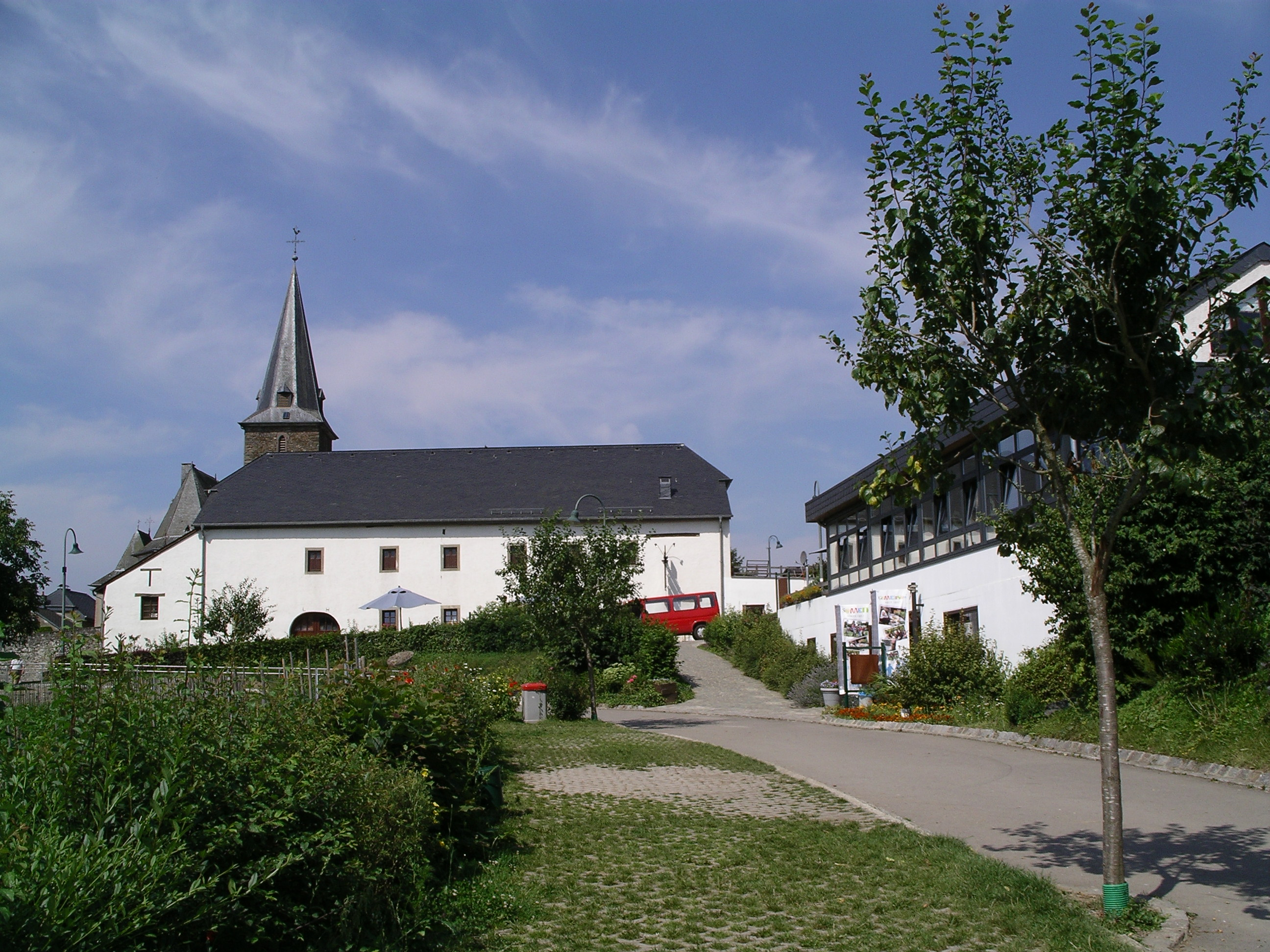 Robbesscheier, Touristenattraktion